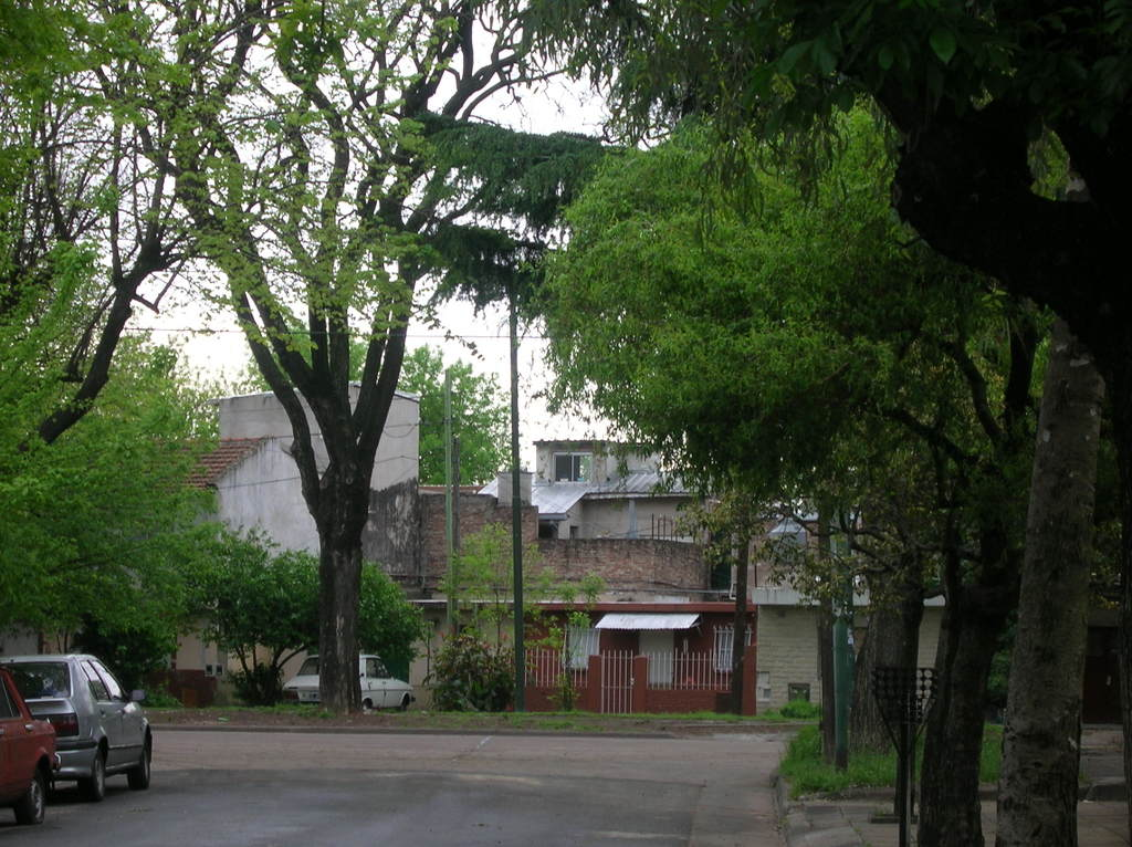 Foto del Barrio de Saavedra, específicamente el "Barrio Mitre"